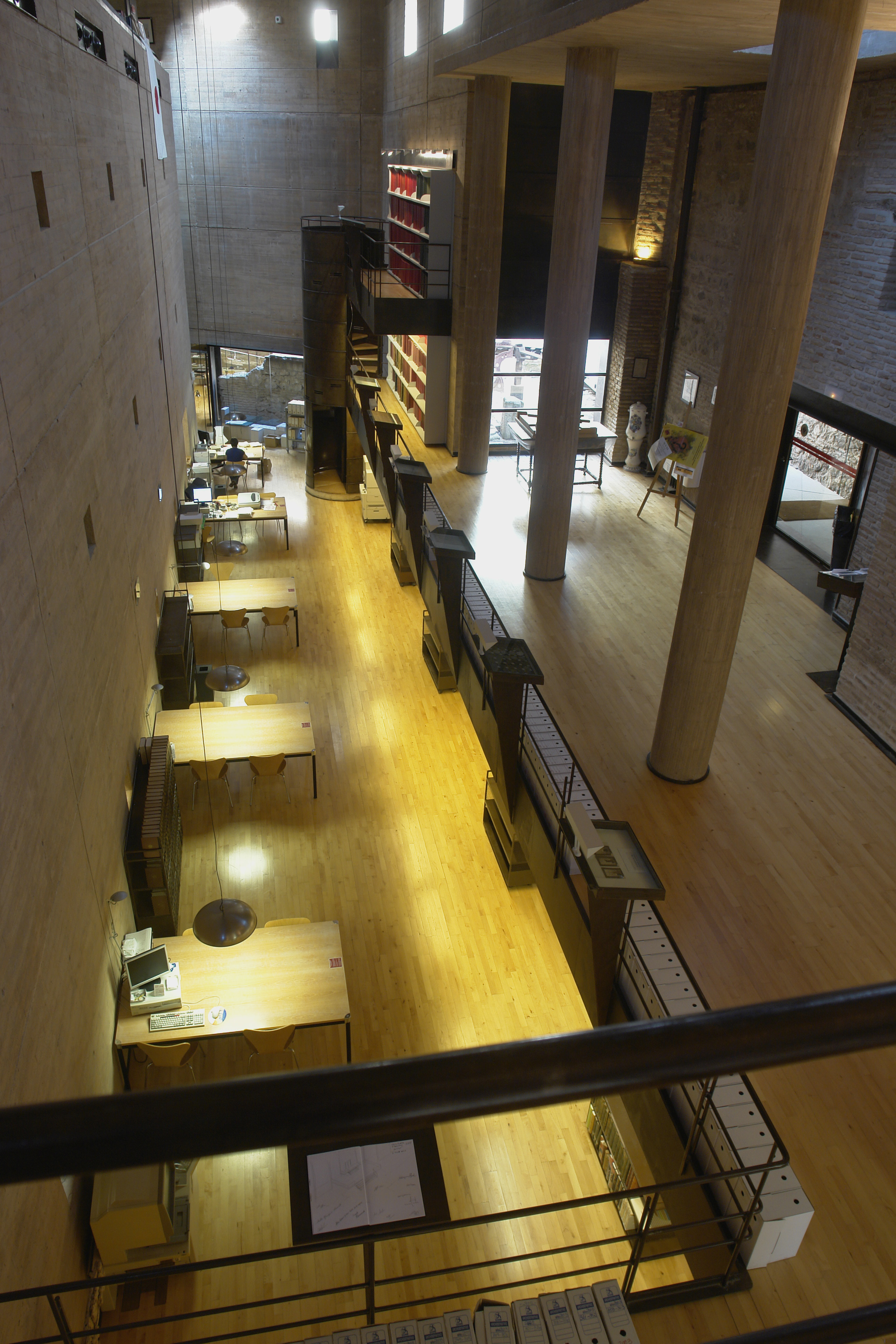 Instancias del Archivo Municiapal de Toledo